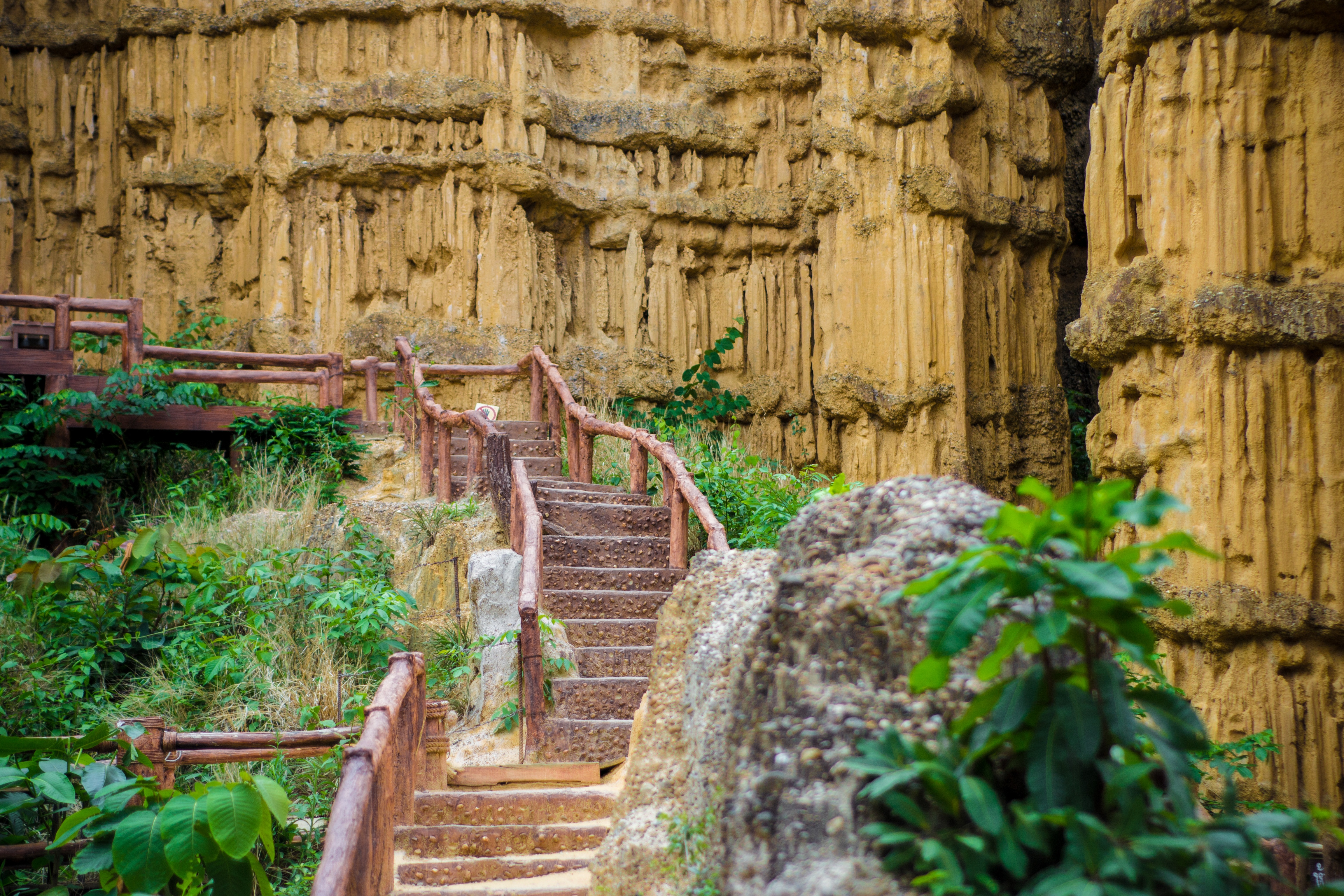 เป็นปรากฏการณ์ตามธรรมชาติที่เกิดจากการกัดเซาะของลมฝนจนทำให้แผ่นดินที่เชื่อกันว่าเมื่อหลายร้อยปี หรือพันปีก่อนบริเวณแห่งนี้เคยเป็นทางเดินของแม่น้ำปิง ซึ่งสังเกตได้จากก้อนกรวดหินกลมมนกระจัดกระจายอยู่ในเนื้อดินจำนวนมาก จนกระทั่งแม่น้ำปิงได้เปลี่ยนสายย้ายทิศไหลผ่านไปที่อื่น บริเวณนี้ก็ได้ถูกยกตัวเป็นเนินเขาสูง ตะกอนแม่น้ำปิงก่อตัวทับถมกันเป็นชั้นๆ ผ่านกลายเวลาและถูกกัดเซาะจนกลายเป็นหน้าผาและเสาดินที่มีรูปร่างแปลกตา คล้ายกับที่แพะเมืองผีในจังหวัดแพร่ หรือฝั่งต้าในจังหวัดพะเยา มีลาดลายที่สวยงามและมีขนาดใหญ่มีความสูงราว 30 เมตร สูง เทียบเรือนยอดไม้